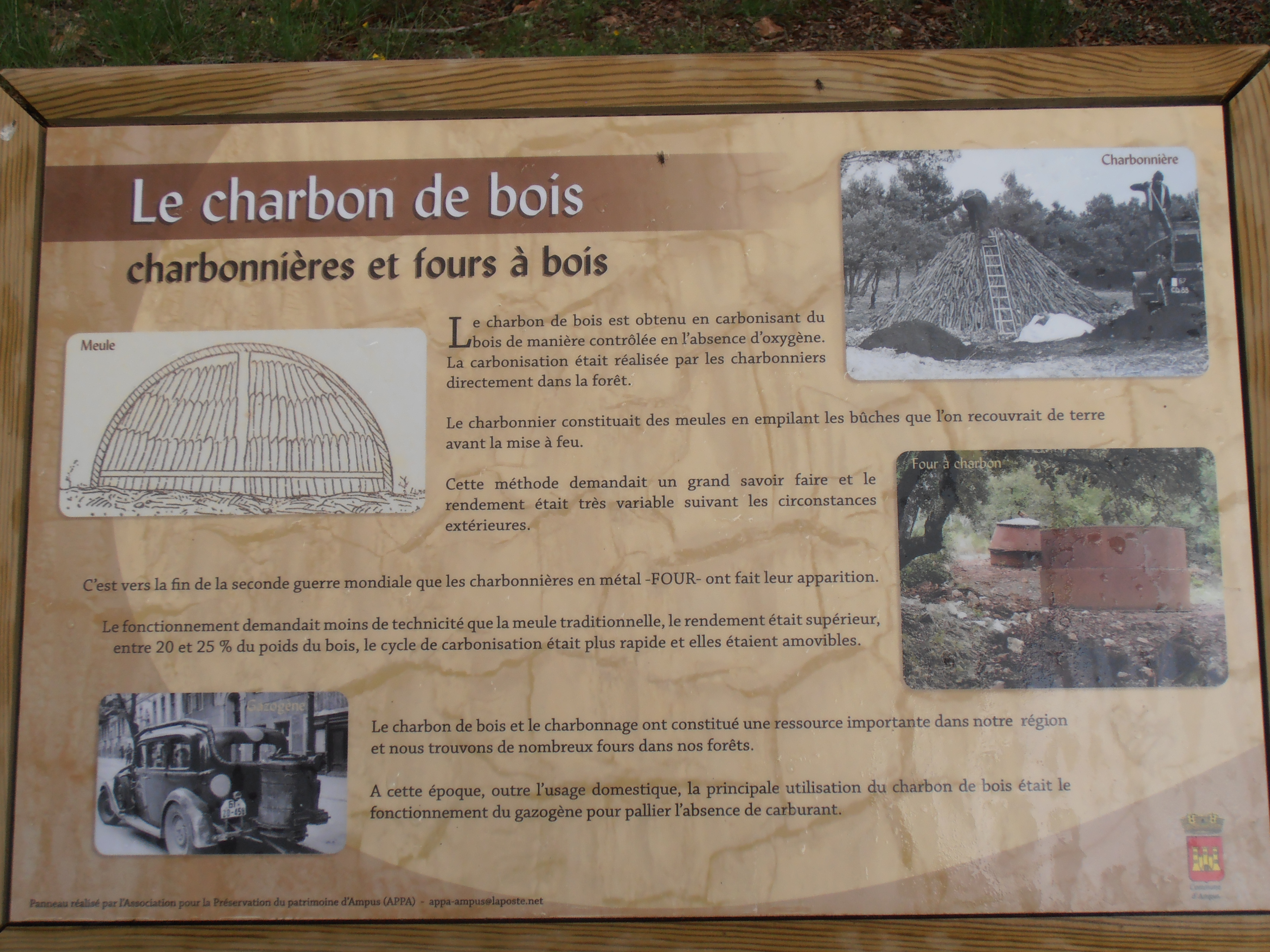 Var, Ampus, Panneau signalétique du sentier de randonnées Notre-Dame-du-Plan Le charbon de bois, charbonnières et fours à bois